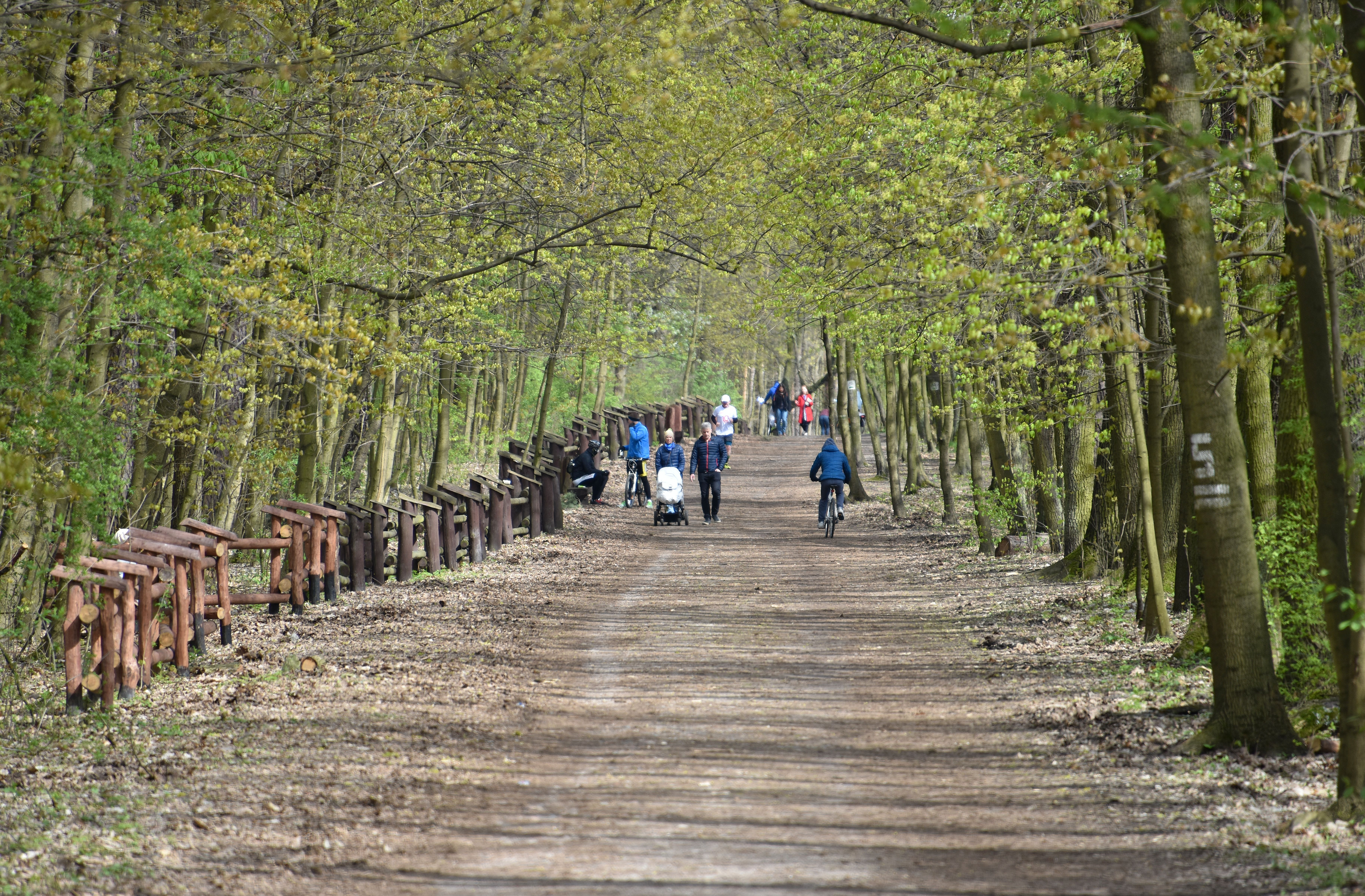 Las Kabacki w Warszawie